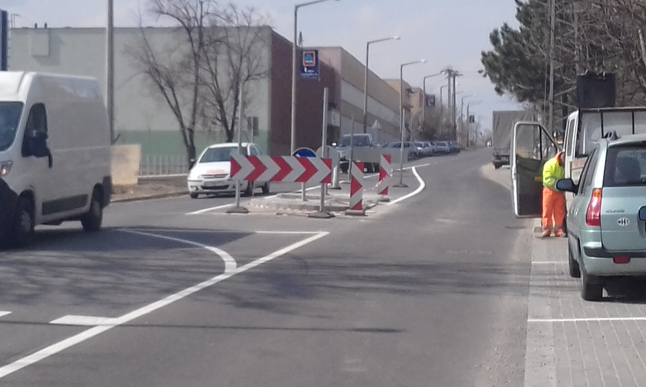 Épül az új Lidl áruházhoz leágazó csomópont a 1107-es úton Solymáron